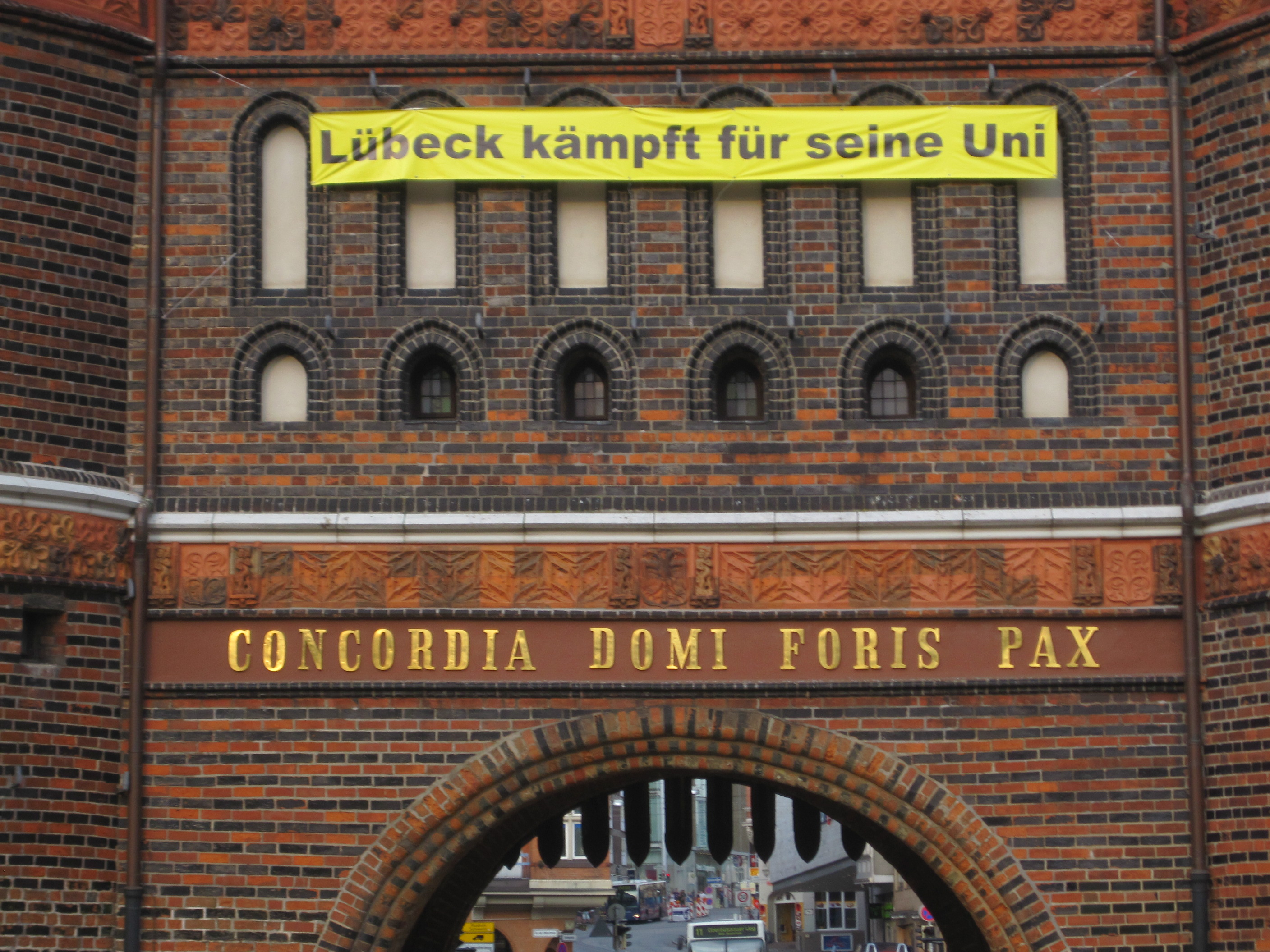 Holstengate in Lübeck